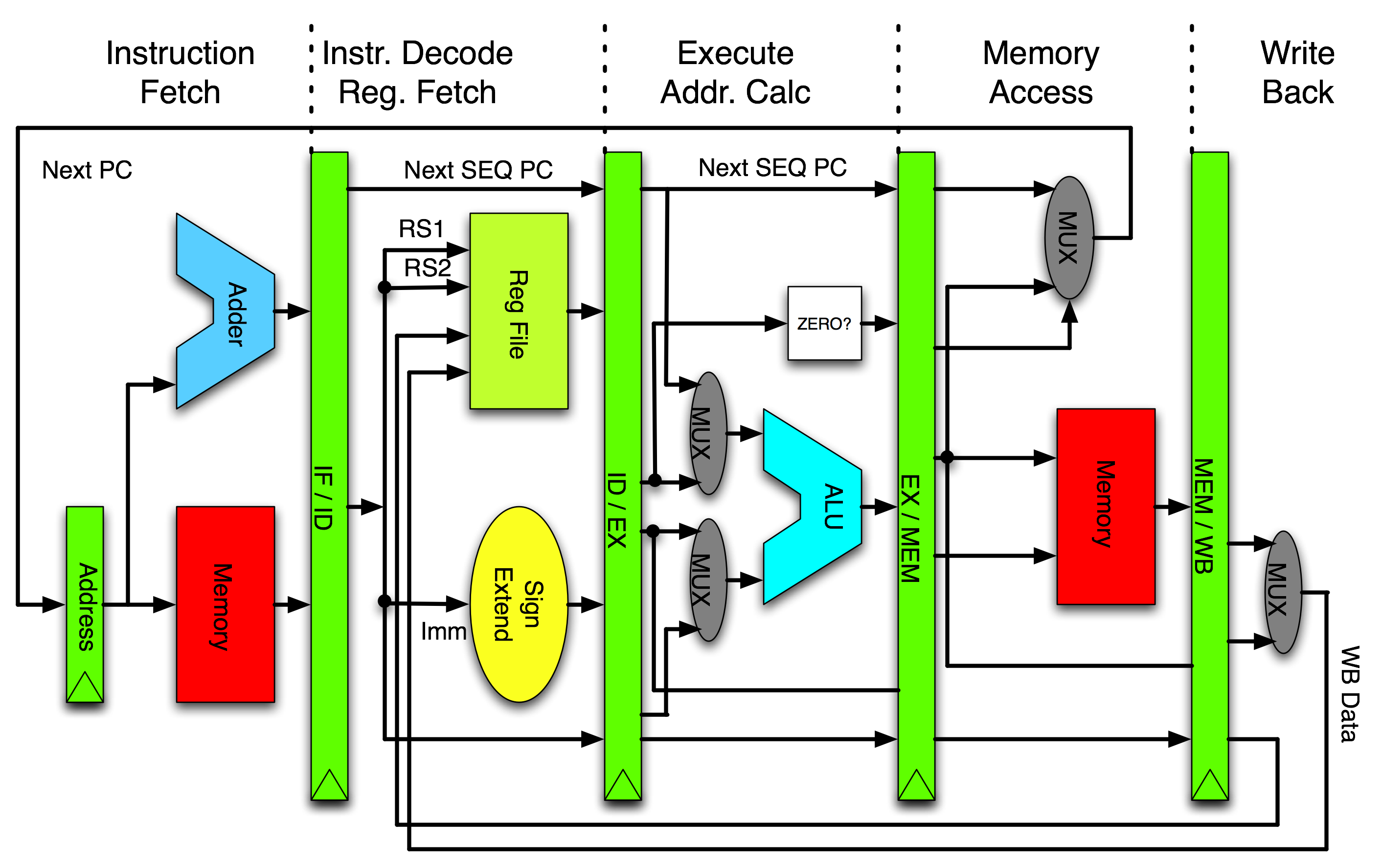 Pipelined MIPS Microprocessor